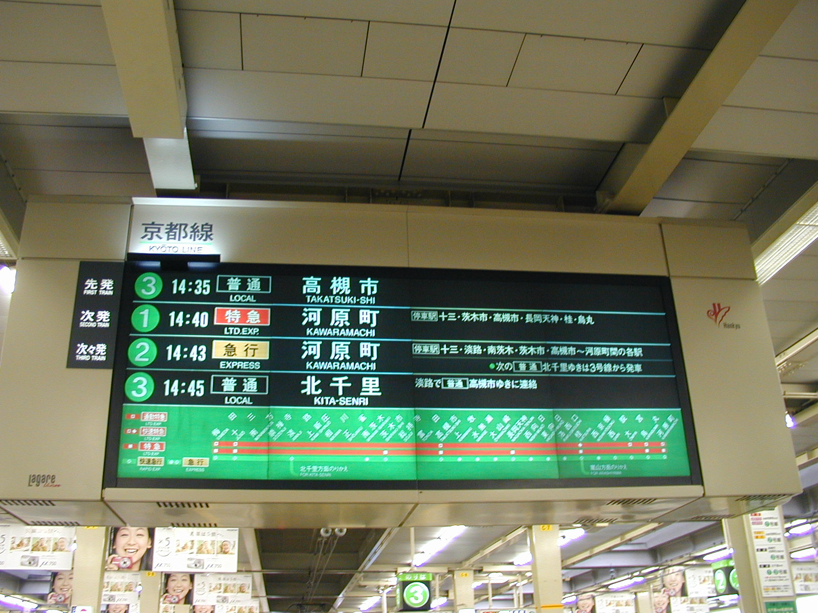 阪急梅田駅にて撮影